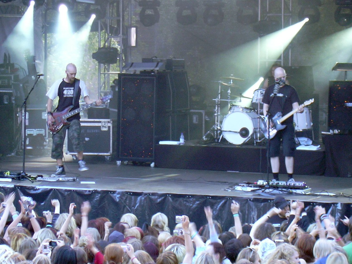 Apulanta in Tampere, en:2006